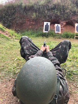 Realização do Tiro de Combate no estande de tiro da Seção de Tiro da ESA.